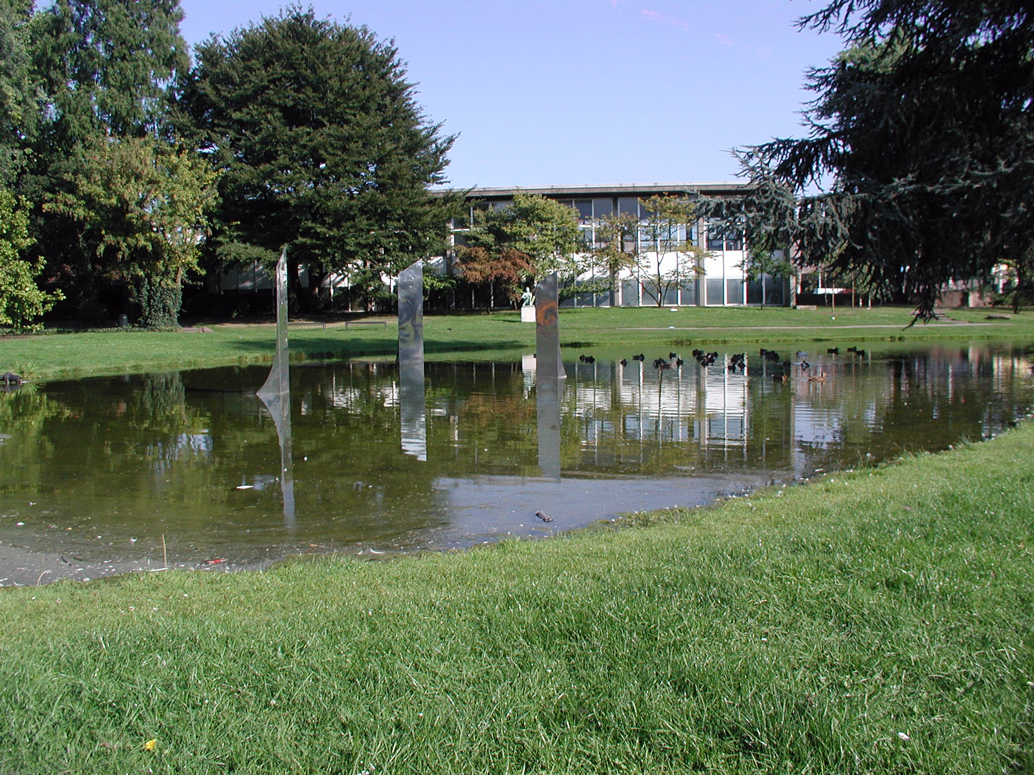 Rheinpark Köln, moderne Kust